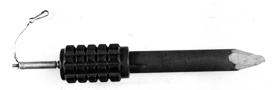 Sowiecka mina przeciwpiechotna POMZ-2